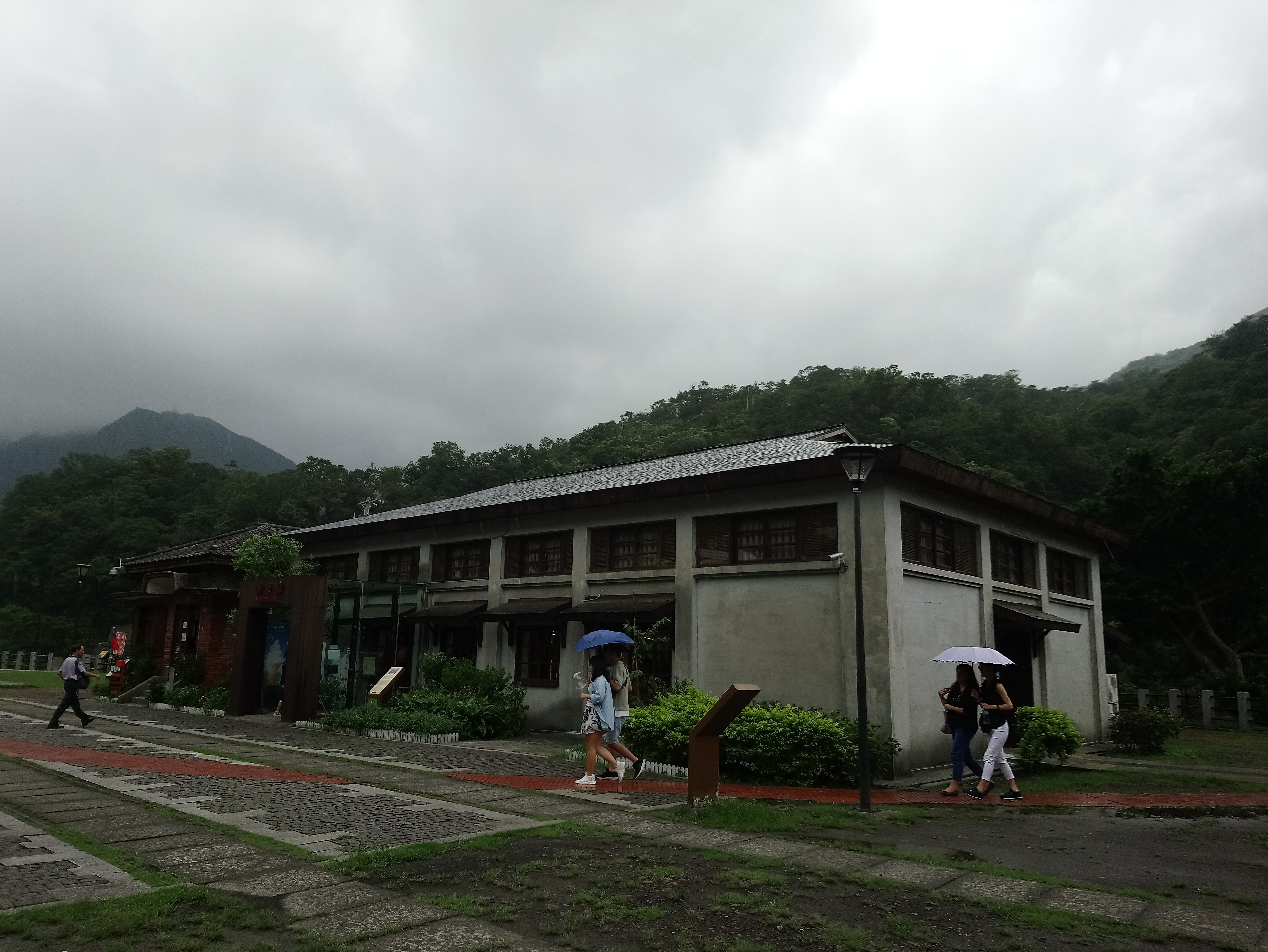 瑞三煤礦整煤場倉庫,新北市瑞芳區猴硐地區光復里